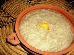 ավանդական հարիսա՝ մսով